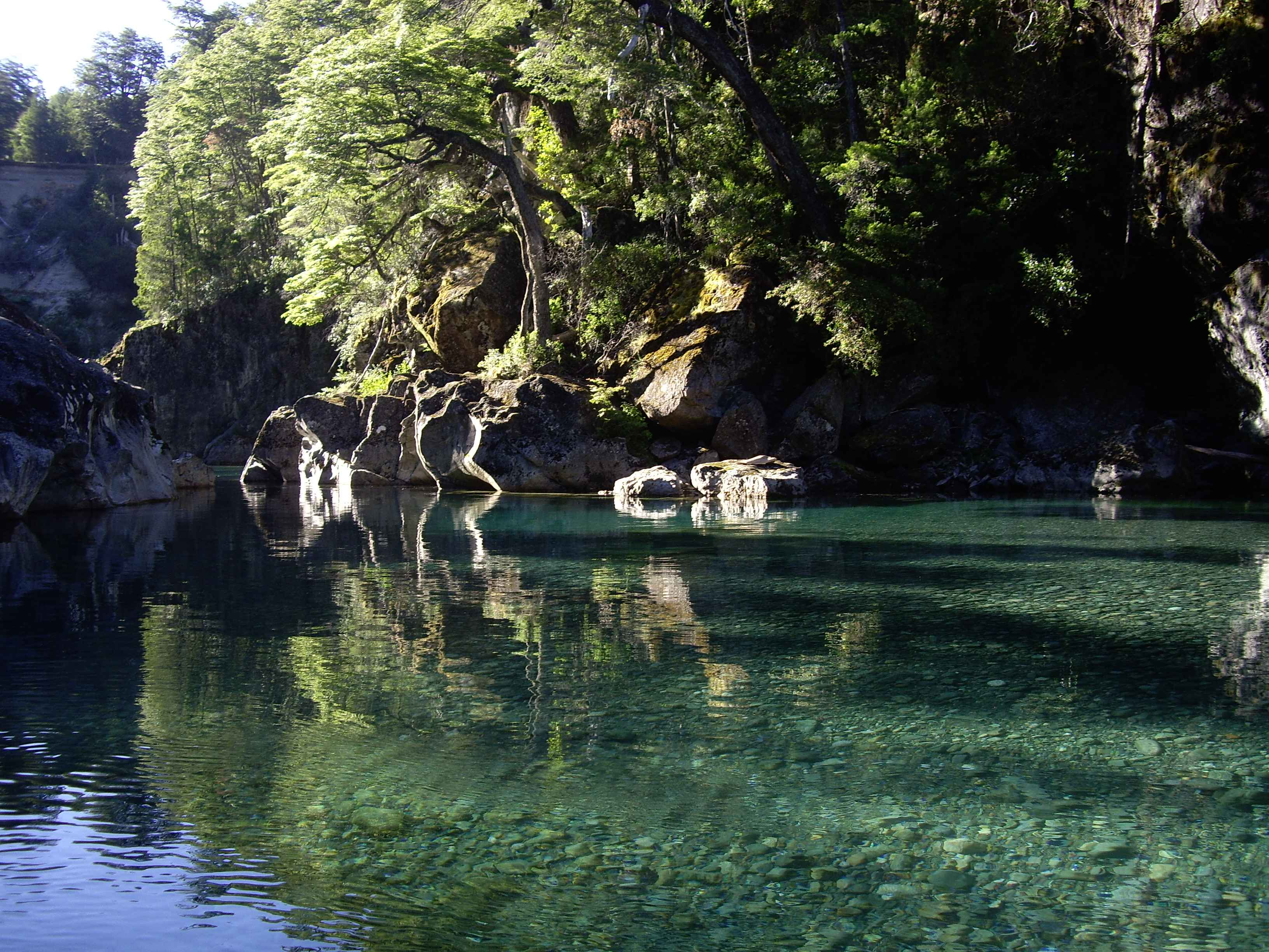 Camino al refugio de montaña Cajón del Azul, vista del Río Azul un poco después de salir del "cajón" que forma con las piedras